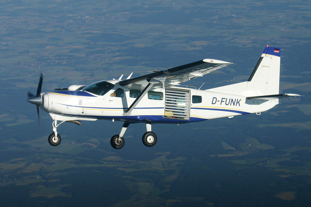 Cessna Caravan D-FUNK über Diepholz